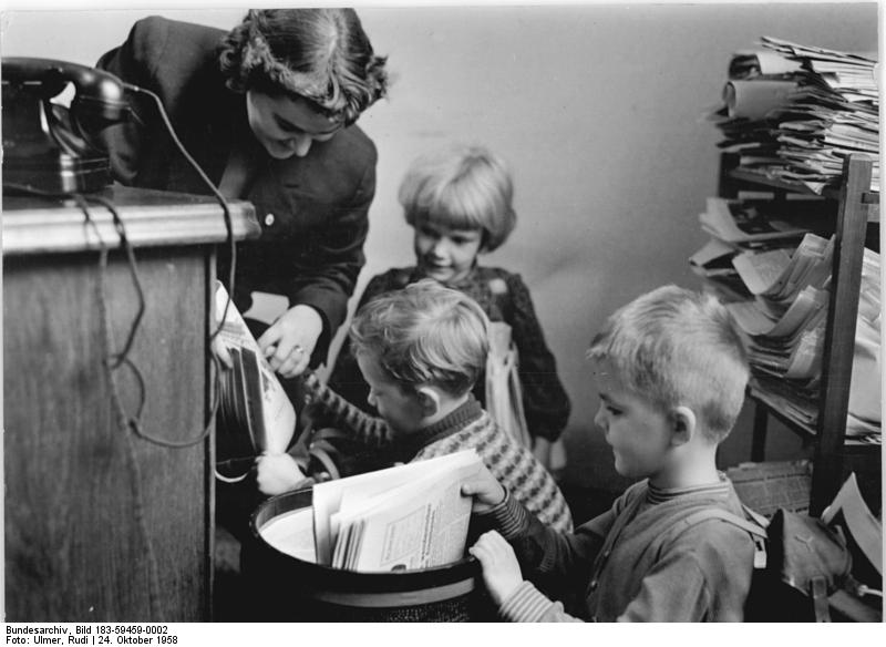 In der Altstoffsammelaktion wollen die Kinder der Kindergärten im Bezirk Berlin Mitte die Mittel für den Kauf eines Tieres zusammensparen, das am Internationalen Kindertag 1959 dem Berliner Tierpark übergeben werden soll. Die Kinder des Bezirksgindergartens im Haus des Nationalrates haben mit Eifer ihre Sammelaktion gegonnen und ziehen, mit Taschen und Rucksäcken, durch die Büroräume. U.B:z.: In der Kulturredaktion bei der Kollegin Kati Schulz werden Papierkorb und Schreibtischfächer nach Altpapier durchsucht.